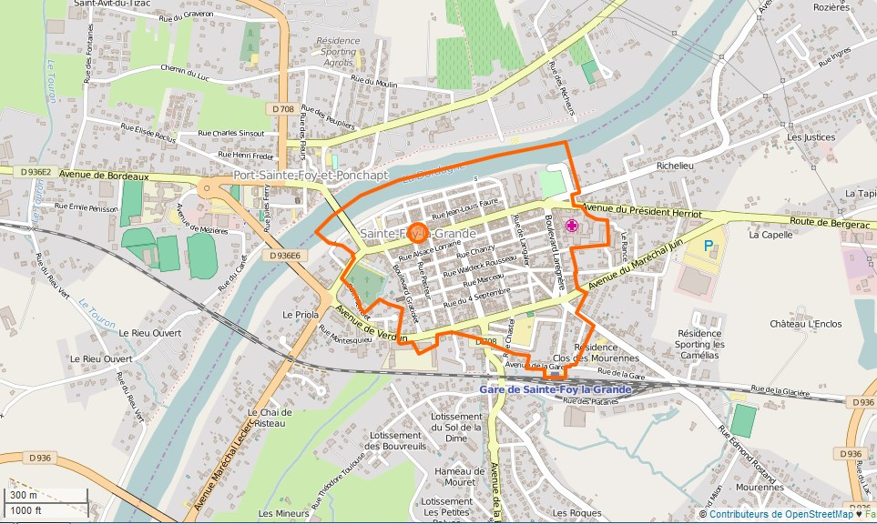 Sainte-Foy-la-Grande Limite communale This map may be incomplete, and may contain errors. Don't rely solely on it for navigation.